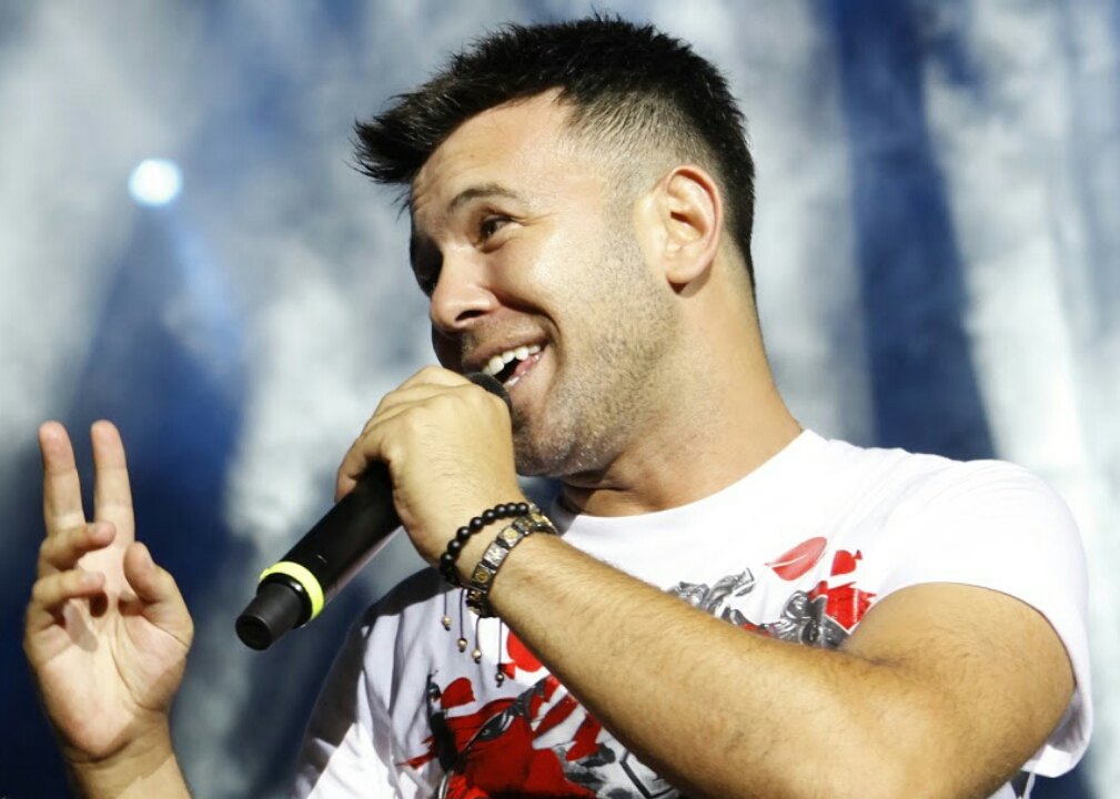 Berksan, Harbiye Cemil Topuzlu Açıkhava Tiyatrosu'nda sahnede.